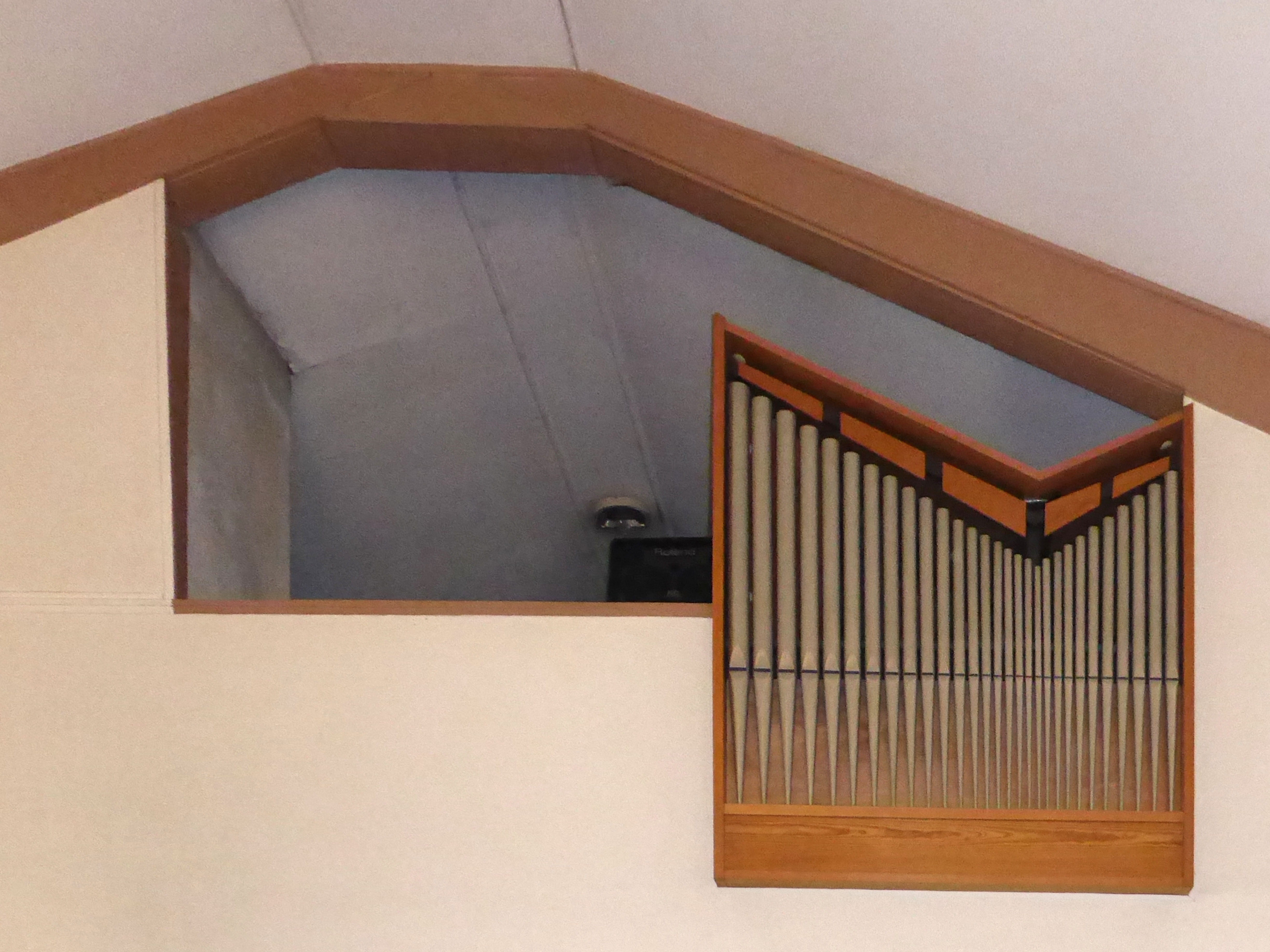 Orgel der katholischen Kirche St. Josef in Steckelsdorf.